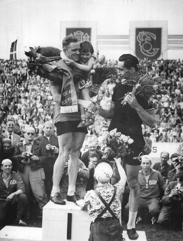 "Täve" Schur, Vagn Dangsborg Zentralbild Wendorf-Schmidt Zastr-Ho 13.5.1960 - XIII. Friedensfahrt 1960 - 12. Etappe am 13.5.1960 von Leipzig nach Halle 40 km Einzelzeitfahren und von Halle nach Magdeburg über 88 km. UBz: Siegerehrung in Magdeburg. Der Sieger dieser Etappe Gustav-Adolf Schur und Vagn Dangsborg (Dänemark, rechts).